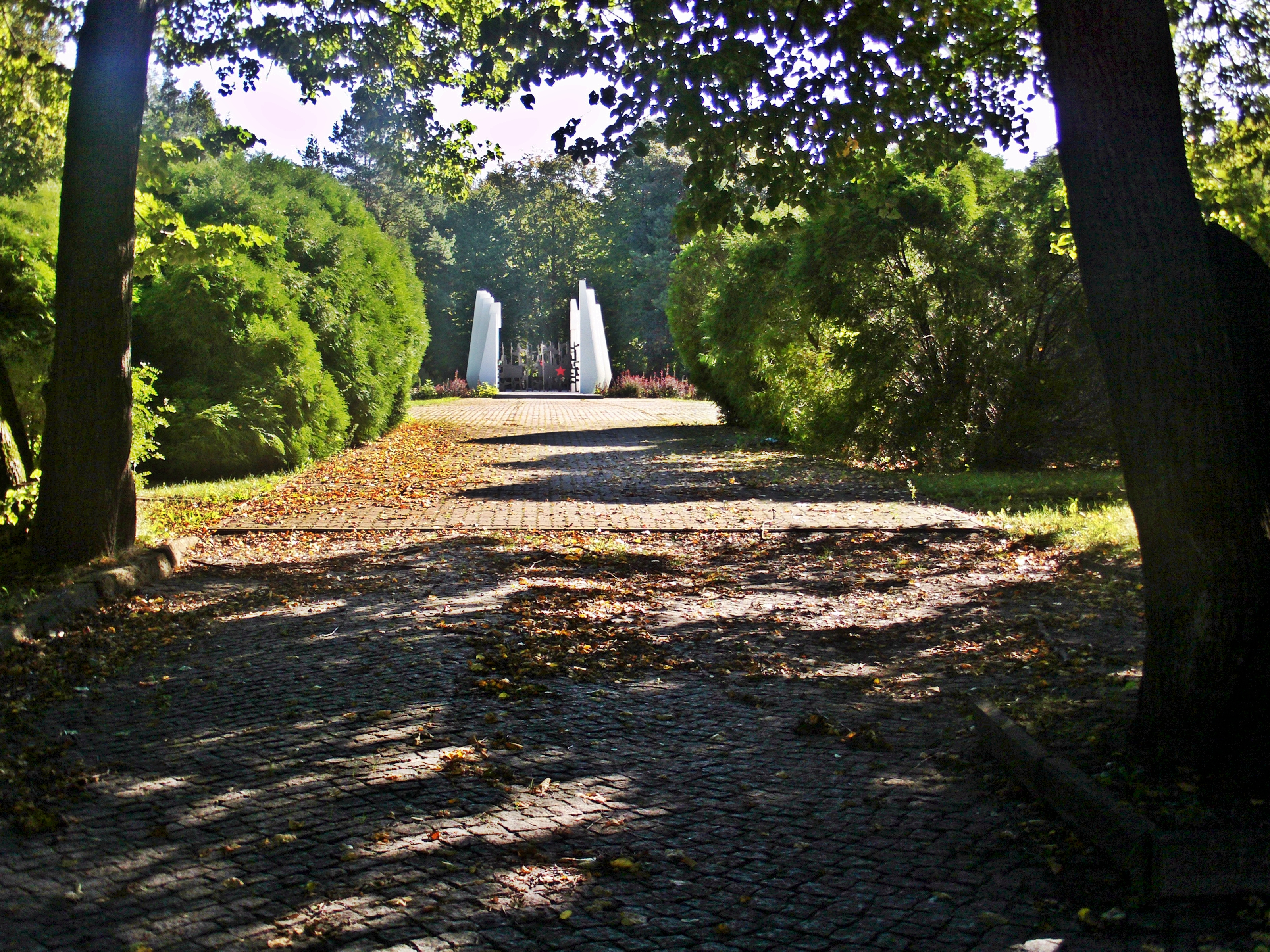 Suwałki - Cmentarz Żołnierzy Radzieckich. Część cmentarza z zielenią parkową (zabytek nr A-832 z 26.08.1991)